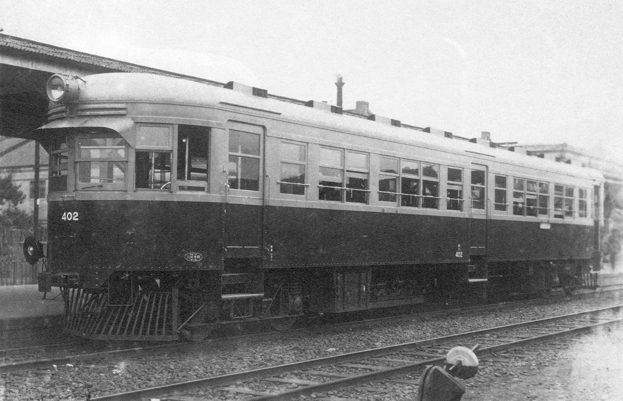 臺灣鐵路大型汽油客車キハ400型，1935年川崎車輛製造，與キハ300型形式相同，後被臺灣鐵路管理局改造為DR2400柴油客車。